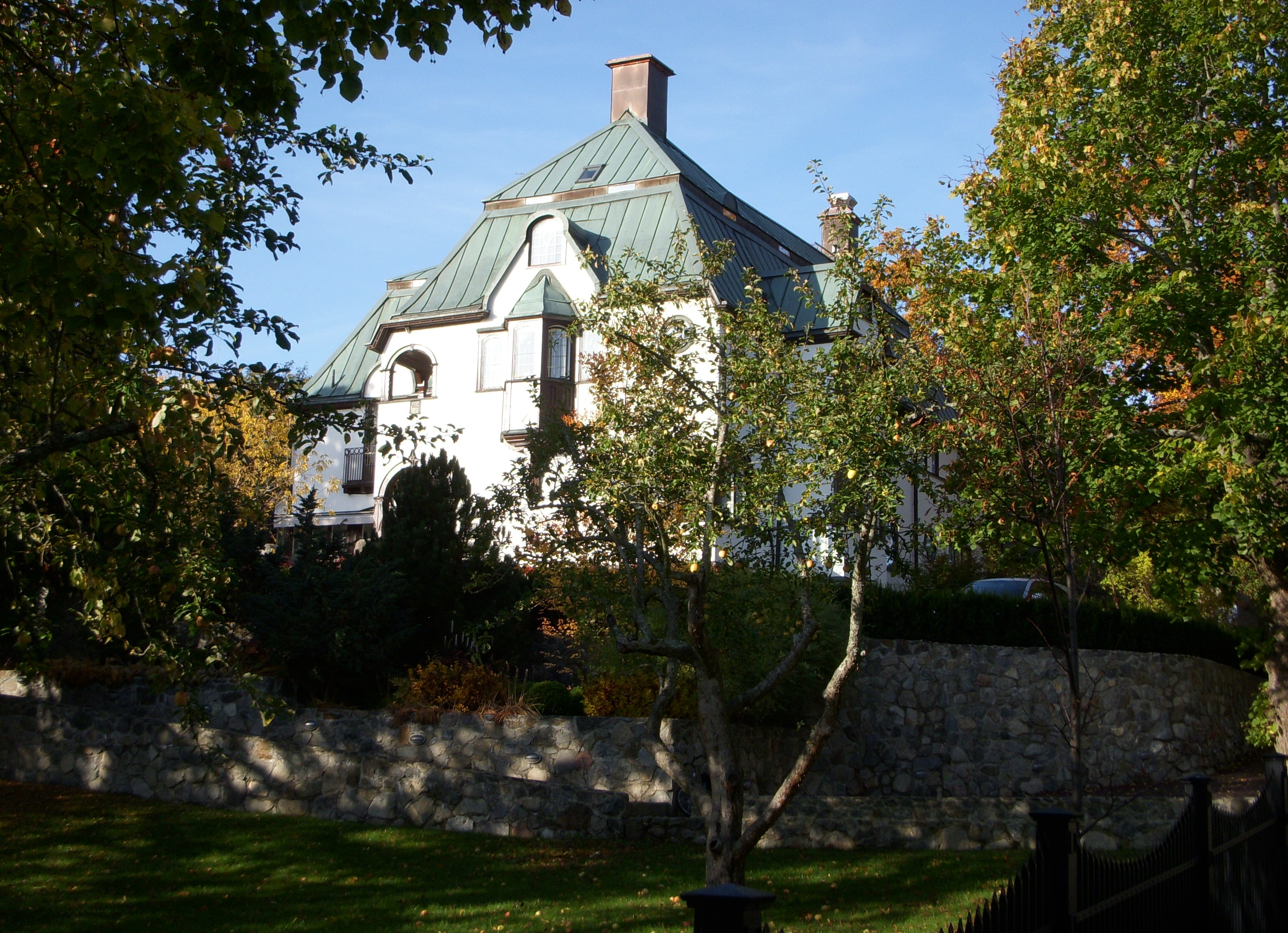 Storängen, fastigheten hörn Järlavägen/Parkvägen, Nacka